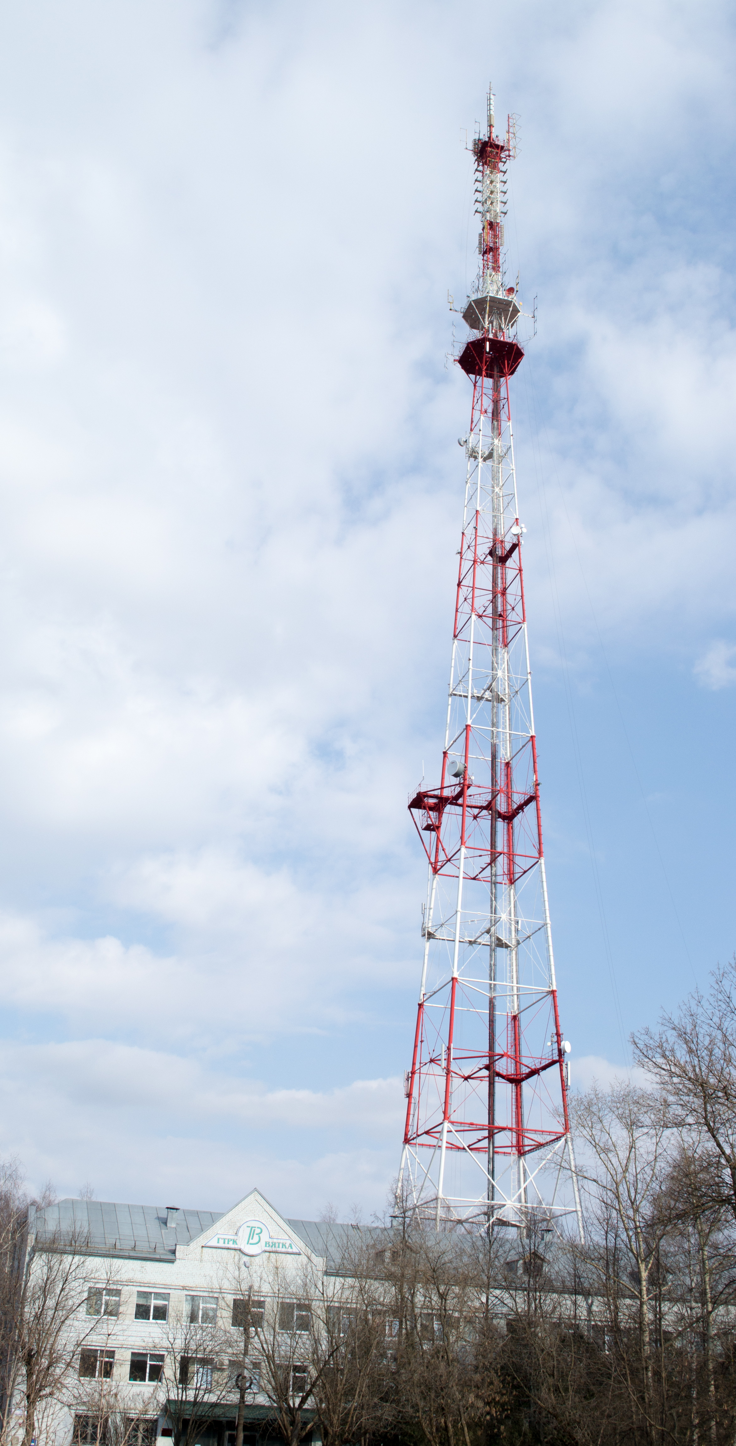 Телевизионная башня в Кирове